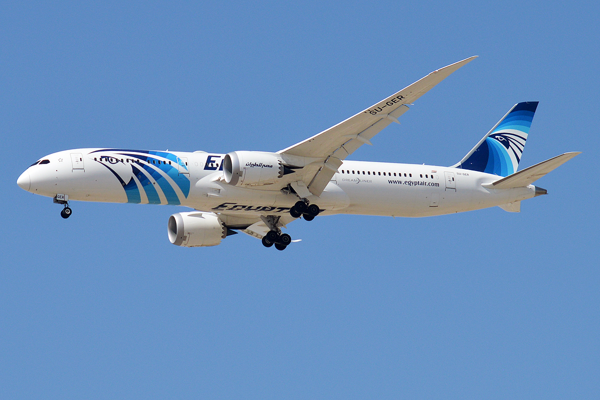 EgyptAir, SU-GER, Boeing 787-9 Dreamliner